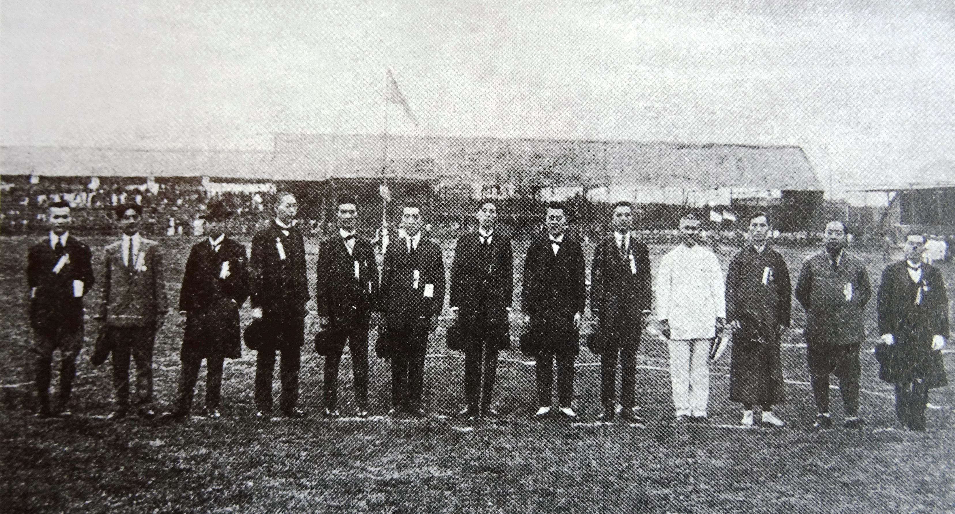 粵語: 1919年2月27號到3月1號，廣東省第七次運動大會喺廣州嘅東較場搞，呢個係開幕禮陣省運會啲職員。由左到右係：丘紀祥，謝恩祿，魏邦平，劉子威，張樞，馮春風，金曾澄，李伯賢，李明德，何劍吳，趙策六，金佩泉，孔昭棟。